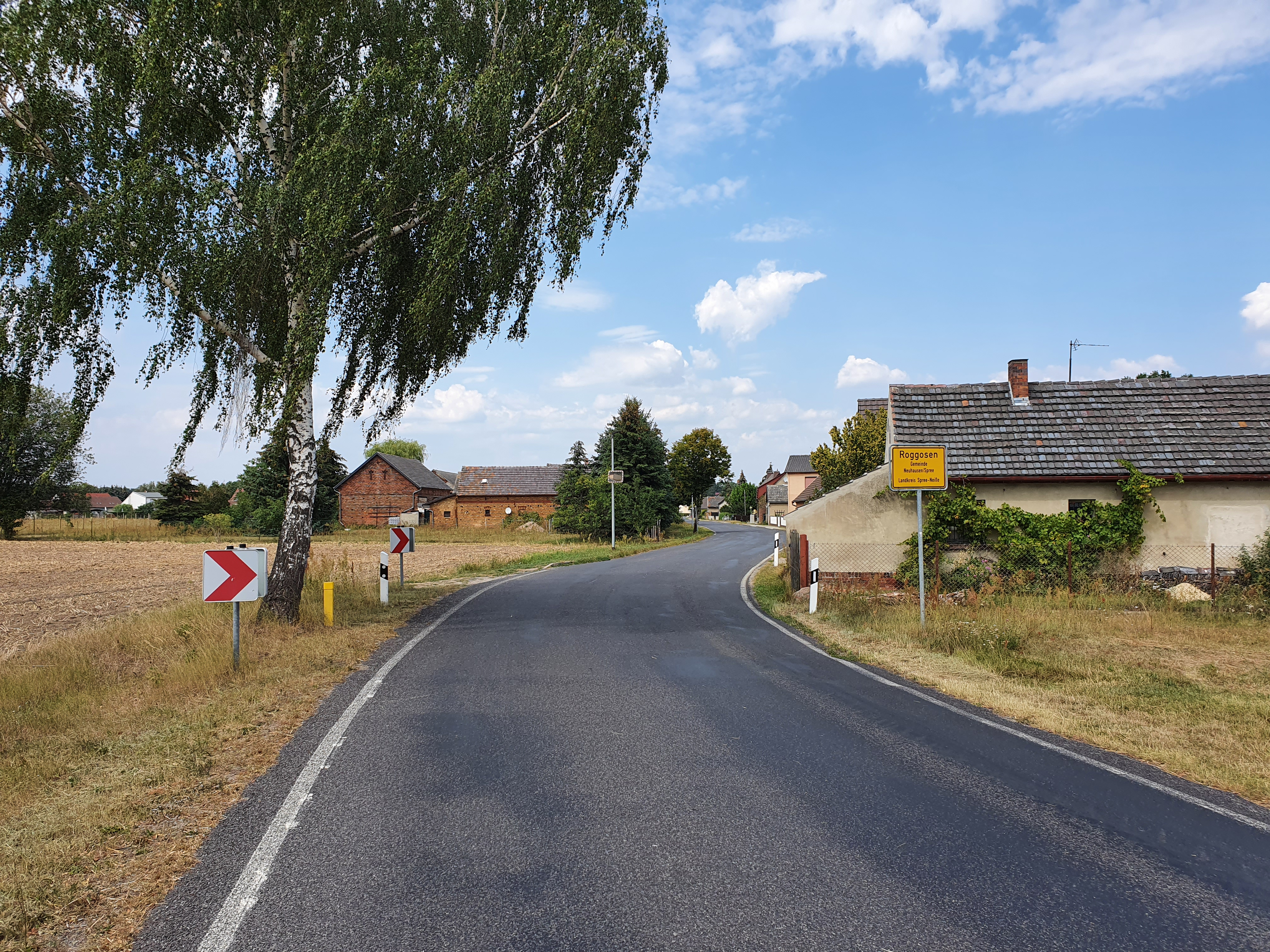 Ortseingang von Roggosen, einem Dorf im Landkreis Spree-Neiße in Brandenburg, aus Richtung Komptendorf kommend.